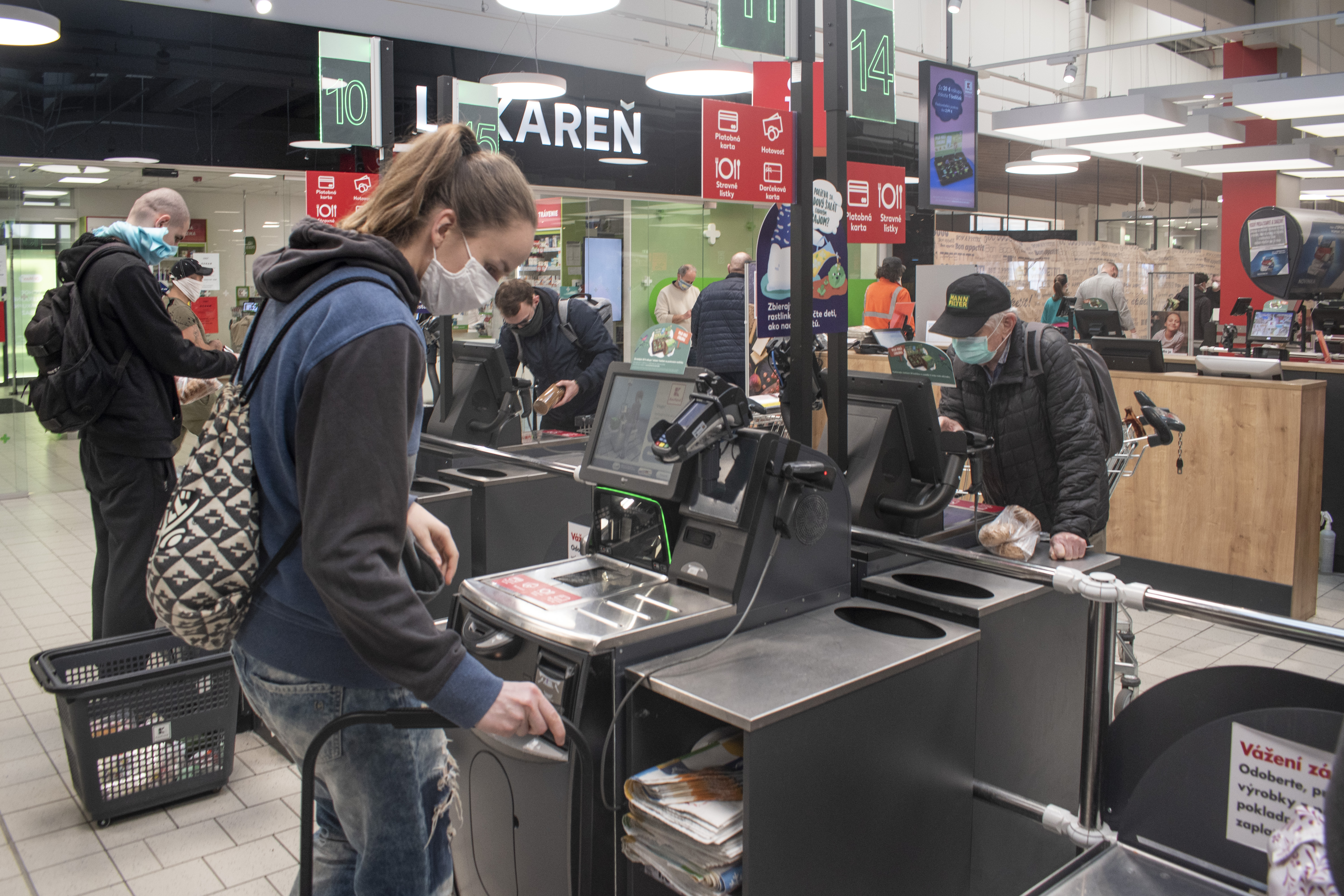 Koronavírus - Bratislavský samosprávny kraj